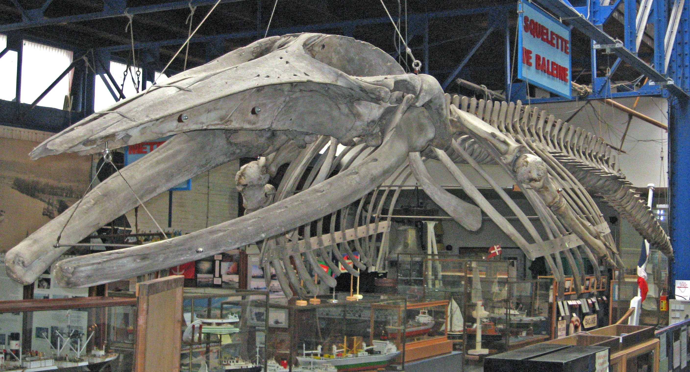 Rouen Musée Maritime Walskelett.